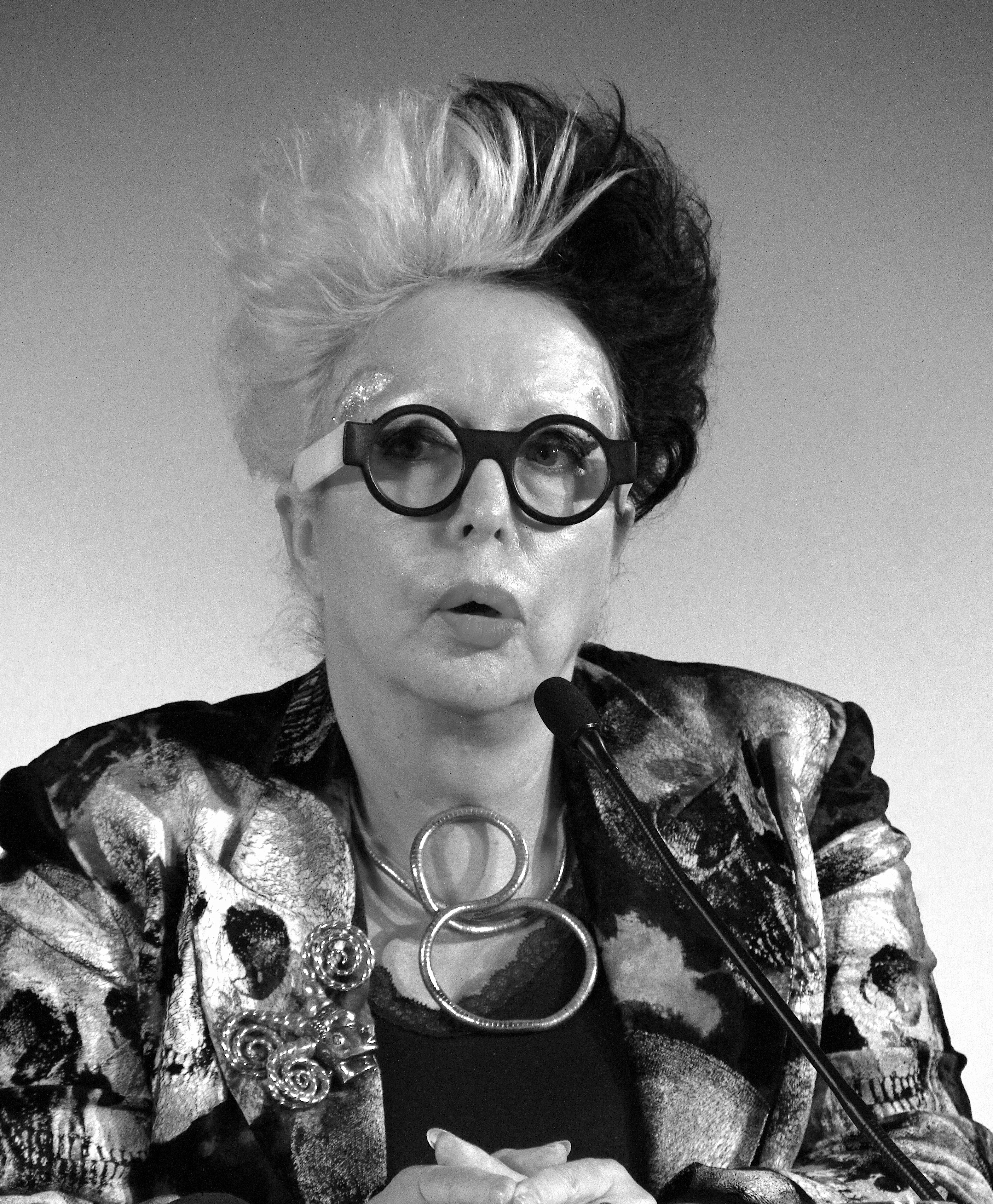 ORLAN, pseudonyme de Mireille Suzanne Francette Porte, est une artiste plasticienne française, née le 30 mai 1947 à Saint-Étienne, qui vit et travaille entre Paris, New York et Los Angeles. L'artiste a choisi d'écrire son pseudonyme en lettres capitales : « ORLAN ».